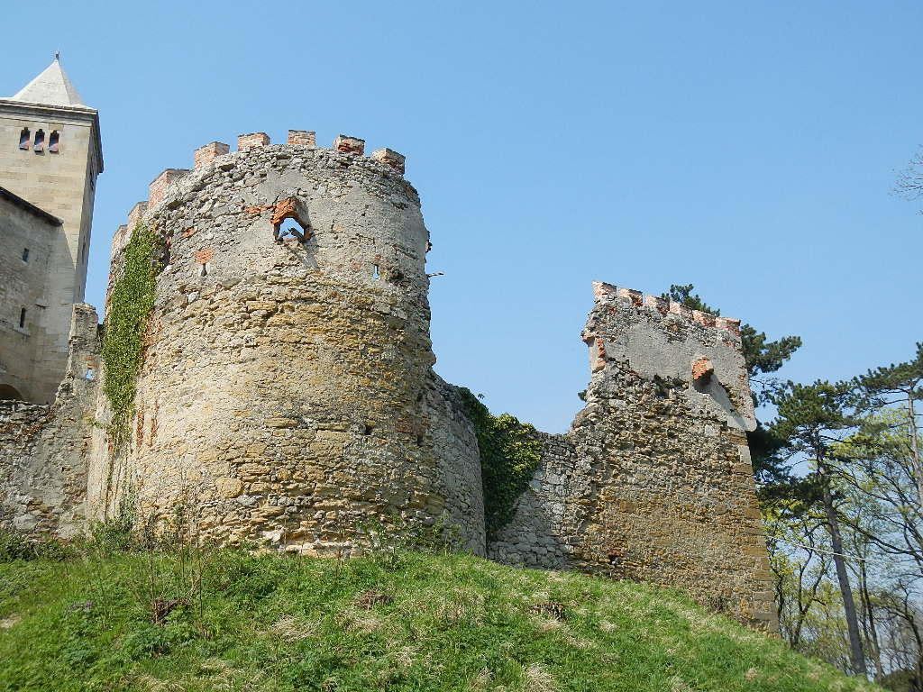 Burg Liechtenstein in Niederösterreich, Maria Enzersdorf im Süden von Wien